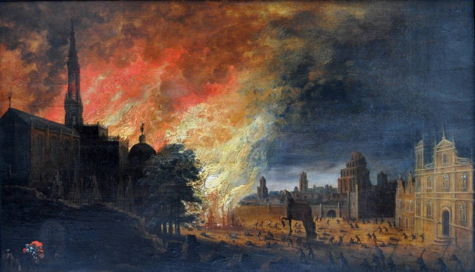 Val van Troje. Olie op paneel, 42 X 70,7 cm.